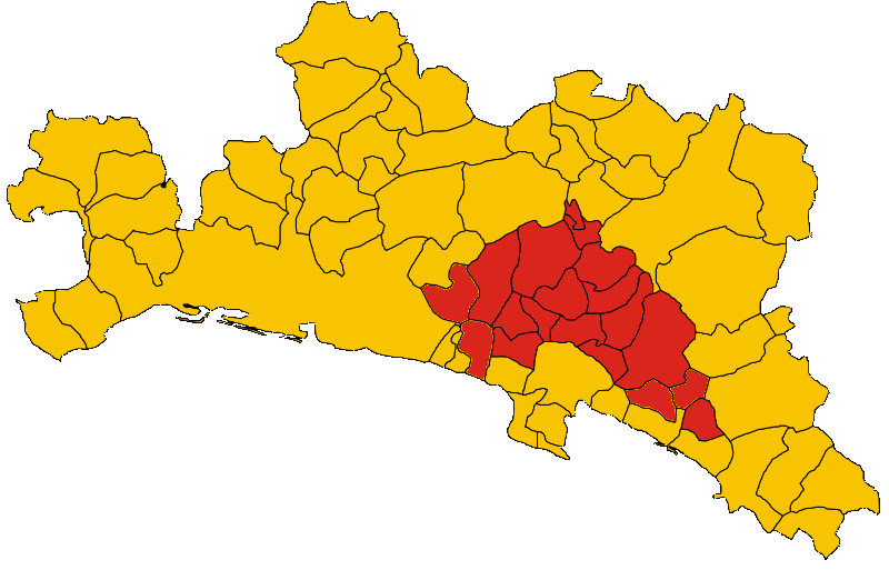 Mappa della Comunità Montana Fontanabuona (Provincia di Genova, Liguria, Italia) con i comuni originari dal 1973 al 2009